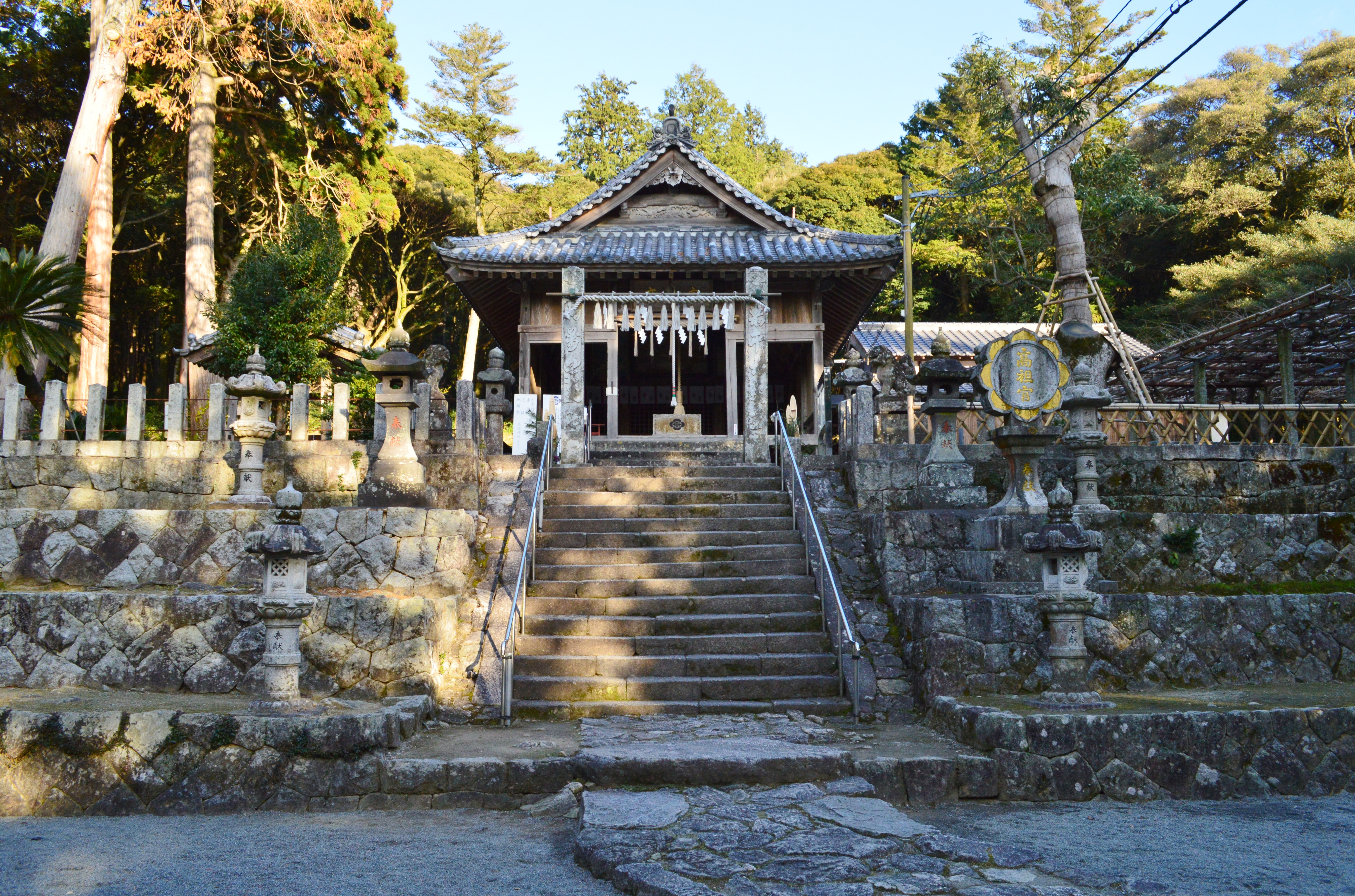 高祖神社 社殿正面